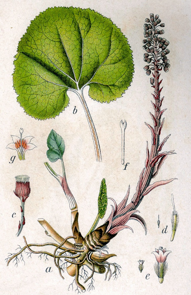 Fig. from book